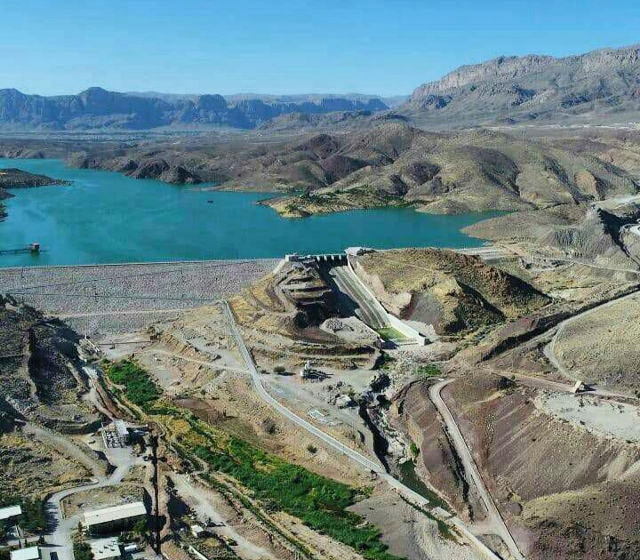 سد رودبال از نمای کوه بالا دست سد عکسبرداری شده توسط کاربر AmirWikiFa